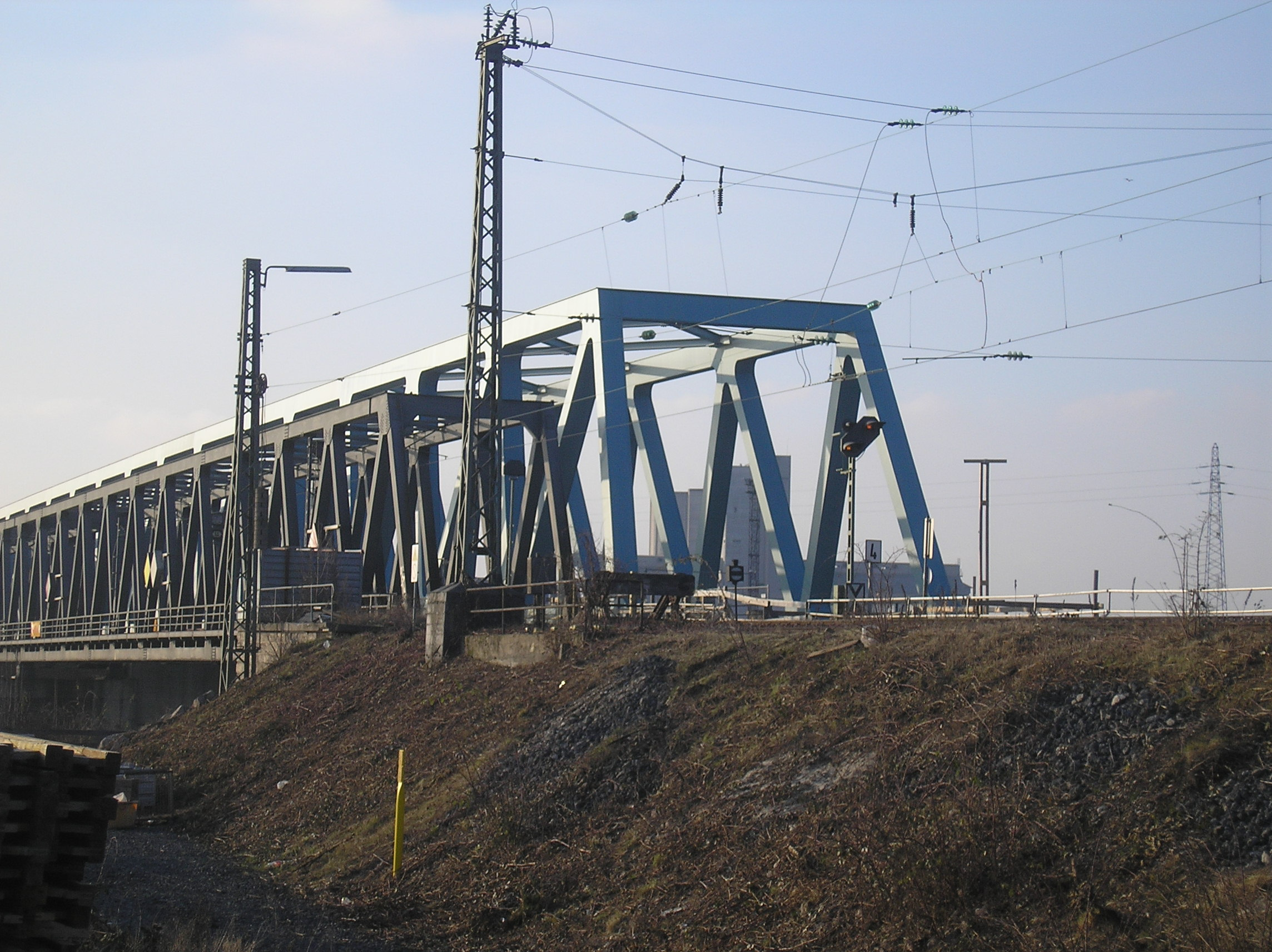 Während der Neubauphase im Januar 2010.